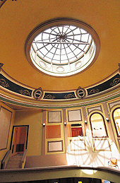 Cupula del Auditorium de La Rotonda de Medicina de la UES